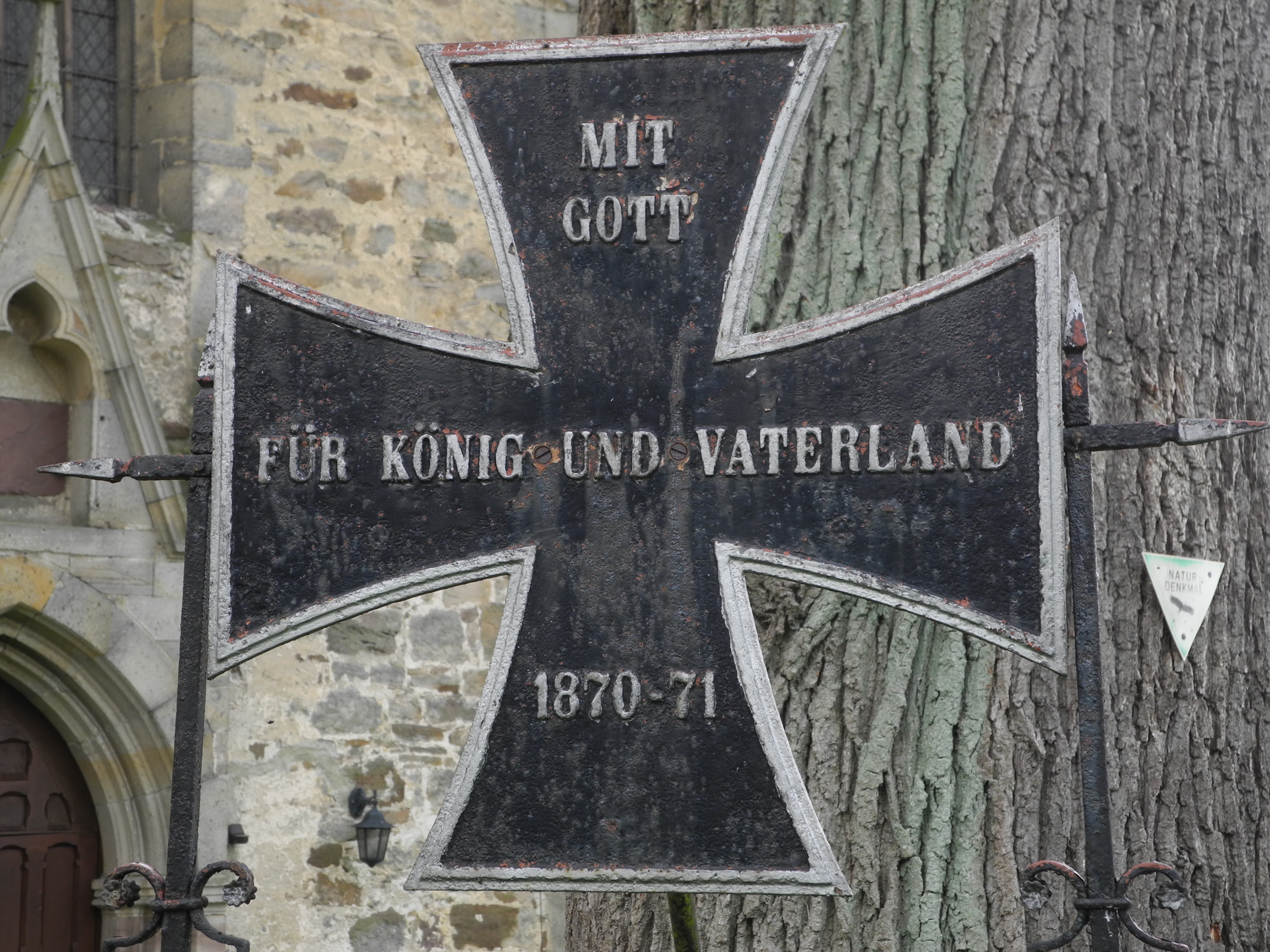 Naturdenkmal im Landkreis Kassel 6.33.769. "Friedenseiche 1870/71" (eine Stieleiche Quercus robur) auf dem Kirchhof von Gottsbüren. Dem Baum zugeordnet ist eine wohl zeitgenössische Eisenkonstruktion mit Widmung.